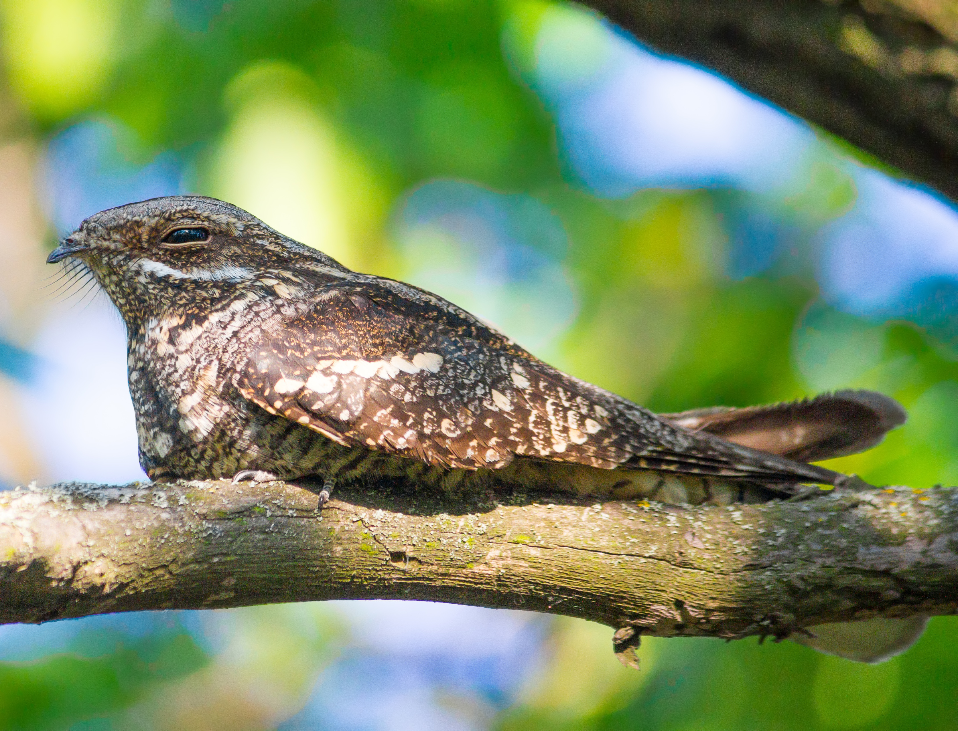 «Дніпровські пороги», м. Запоріжжя, о. Хортиця, о. Байда та скелі посеред р. Дніпро